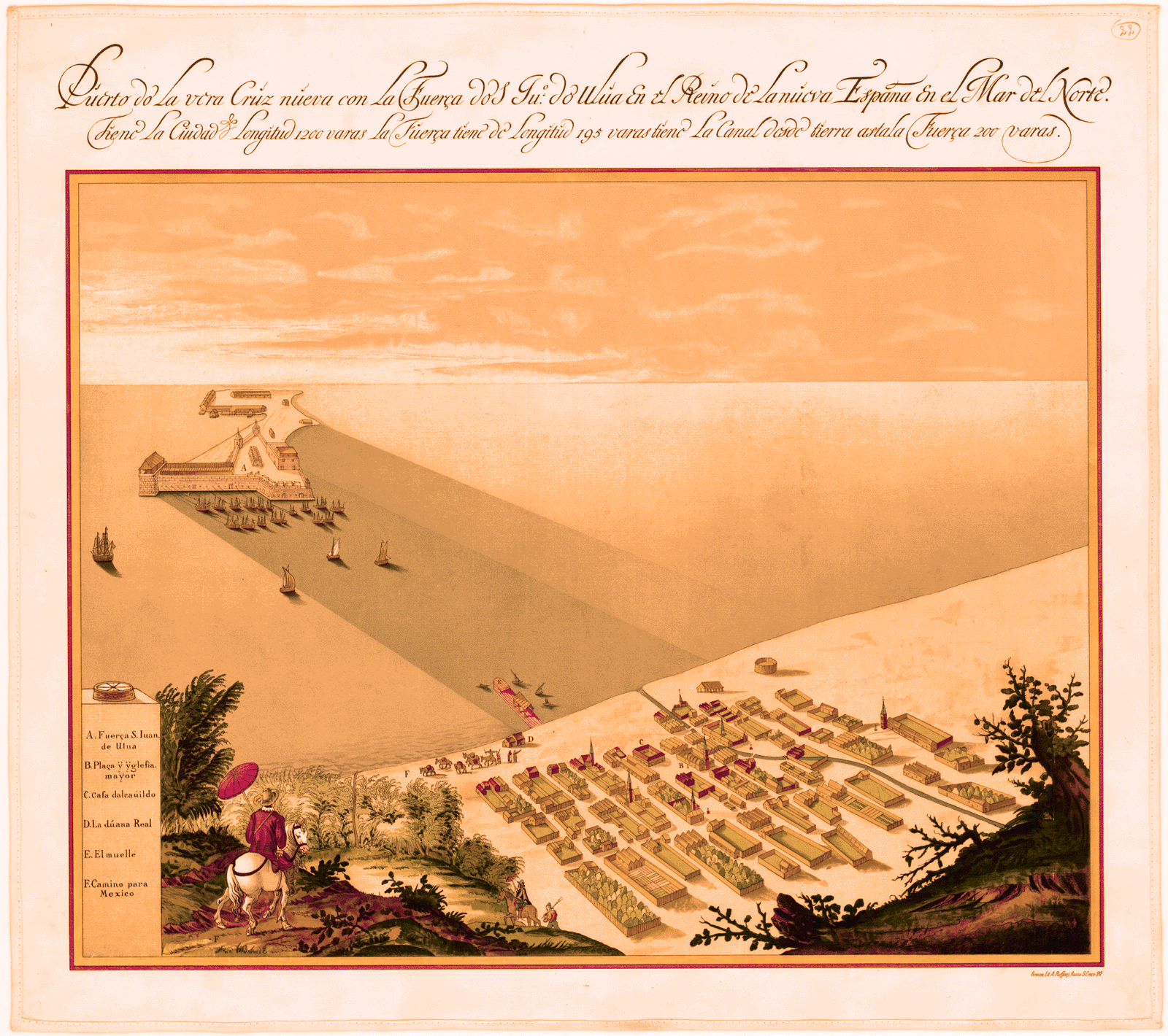 English Old photos of Veracruz City. State of Veracruz. Mexico. Spanish Fotos viejas de la Ciudad de Veracruz. Estado de Veracruz. México. Ciudad de Veracruz y San Juán de Ulúa en 1615 - Veracruz, Veracruz. México Dibujo de la Ciudad de Veracruz y San Juan de Ulúa en 1615. Se le llamaba Ciudad de Tablas debido a que las casas eran de madera con techos de palma.